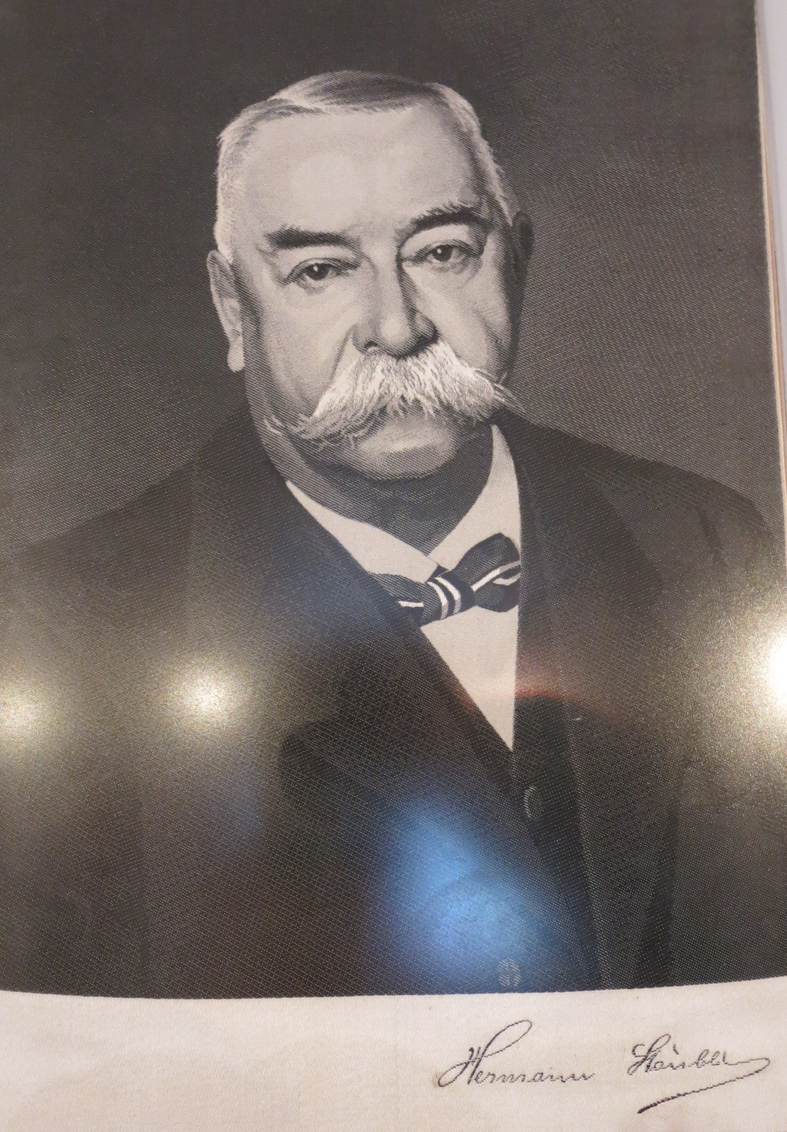 Gebrüder Stäubli, Horgen ZH, Schweiz (Ortsmuseum Sust, Bild in Seide gewoben)